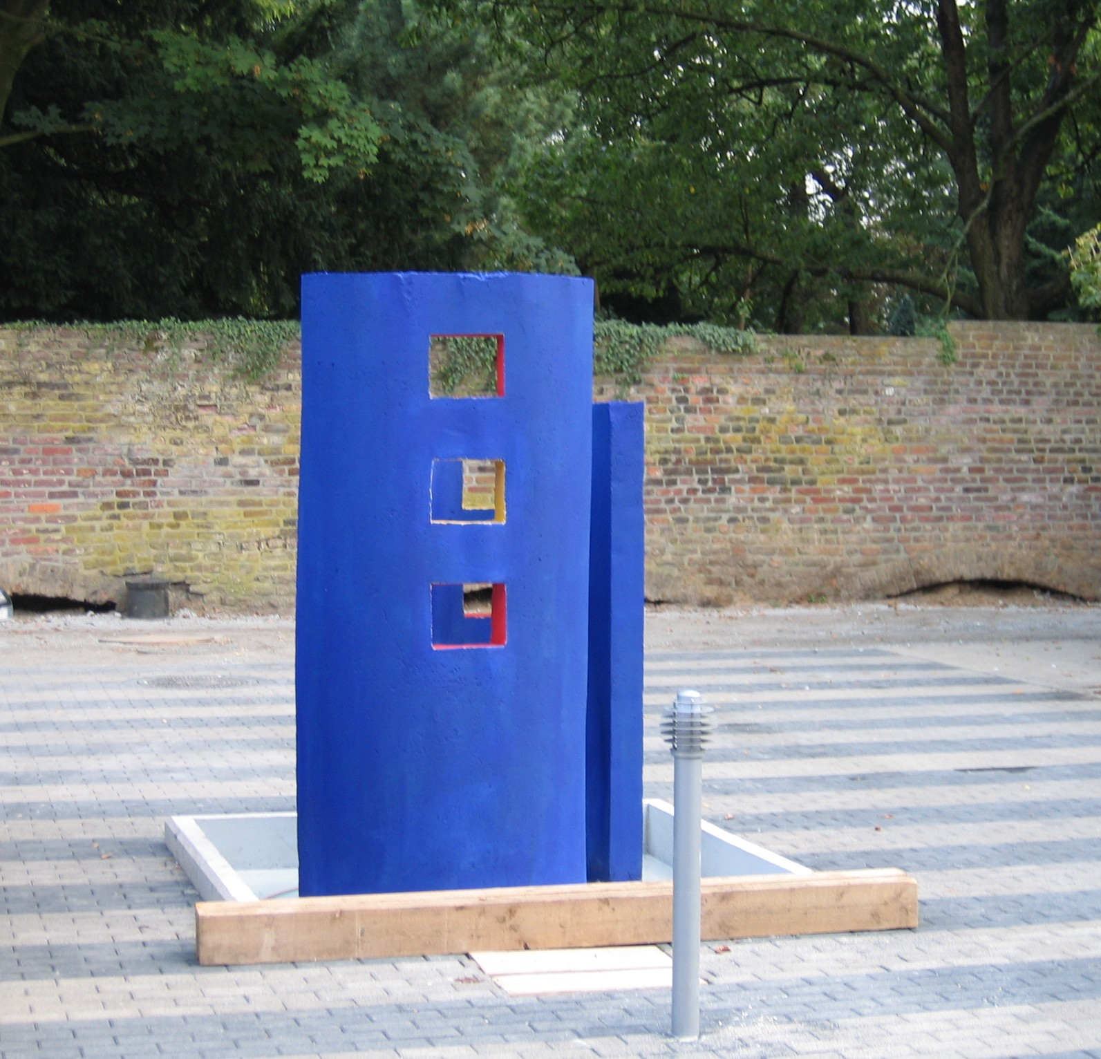 Orsoy - Brunnen am blauen Turm